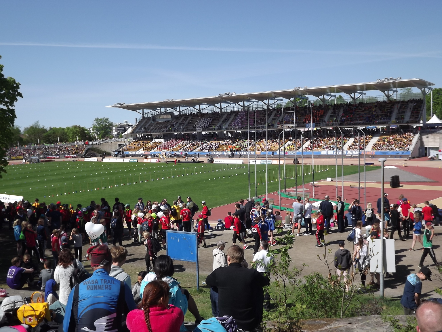 Stafettkarnevalen i Åbo. Paavo Nurmi-stadion inför masstafetten.